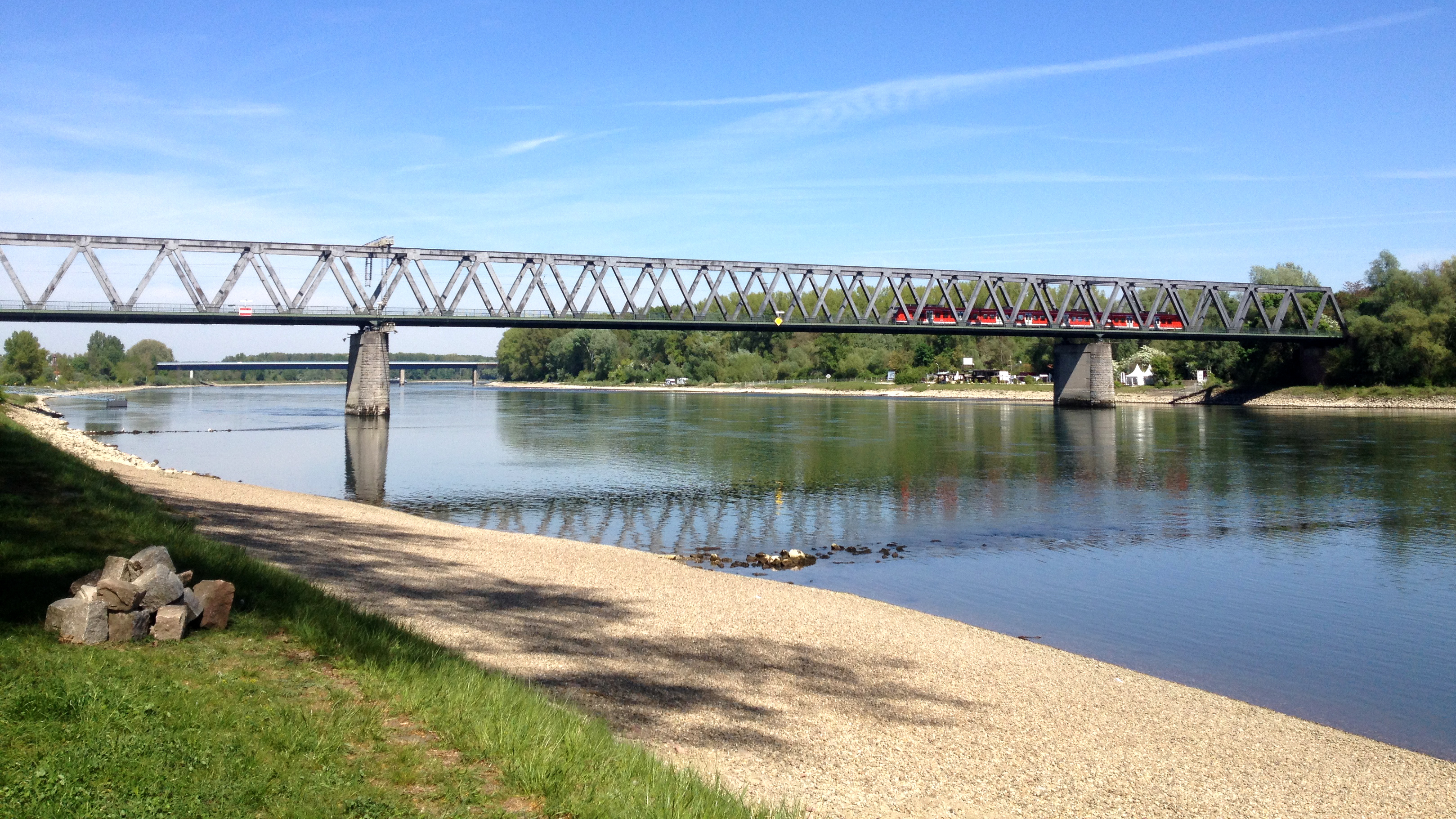 Rheinbrücke (Eisenbahnverkehr) in Germersheim